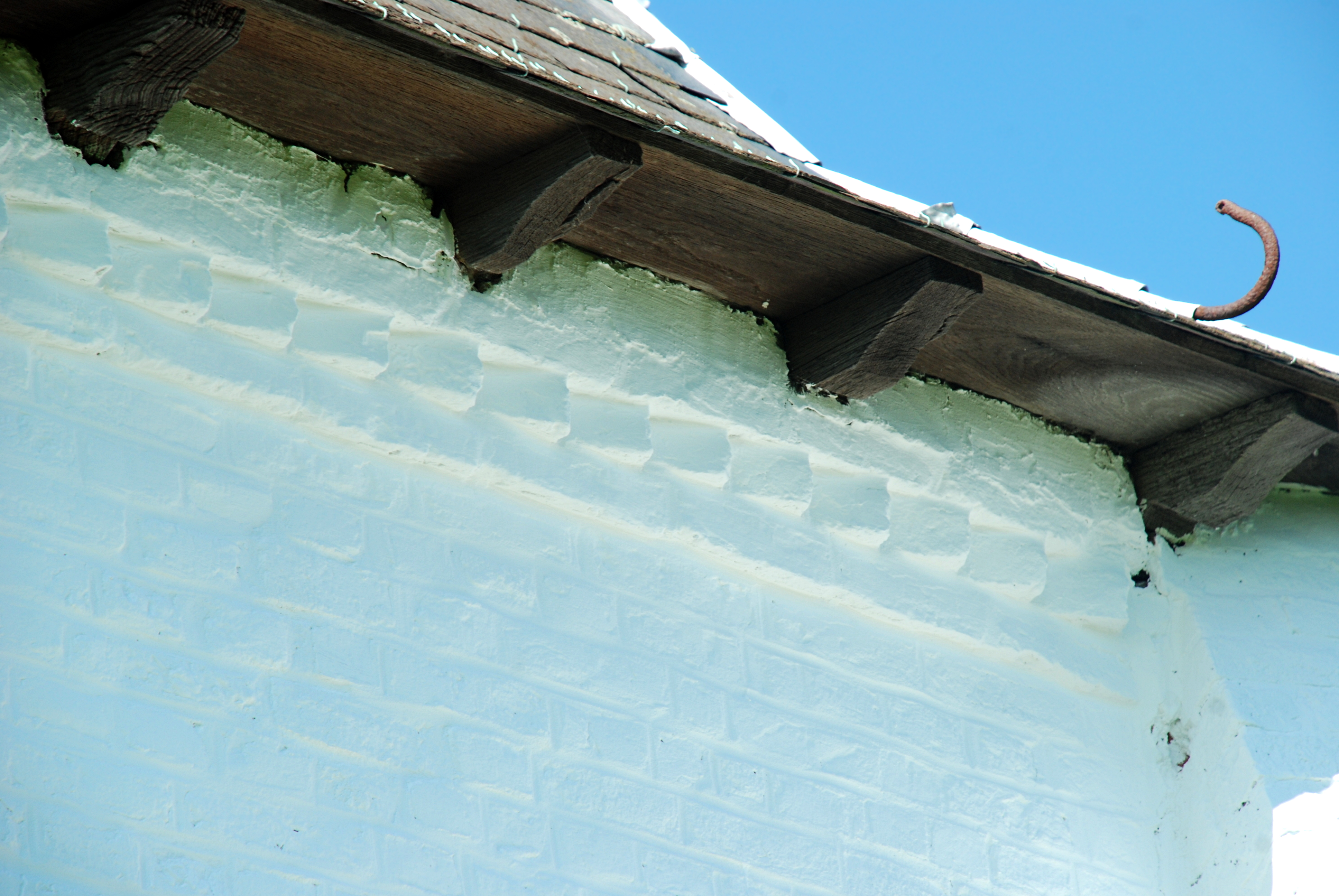 Belgique - Bousval - Chapelle du Try-au-Chêne